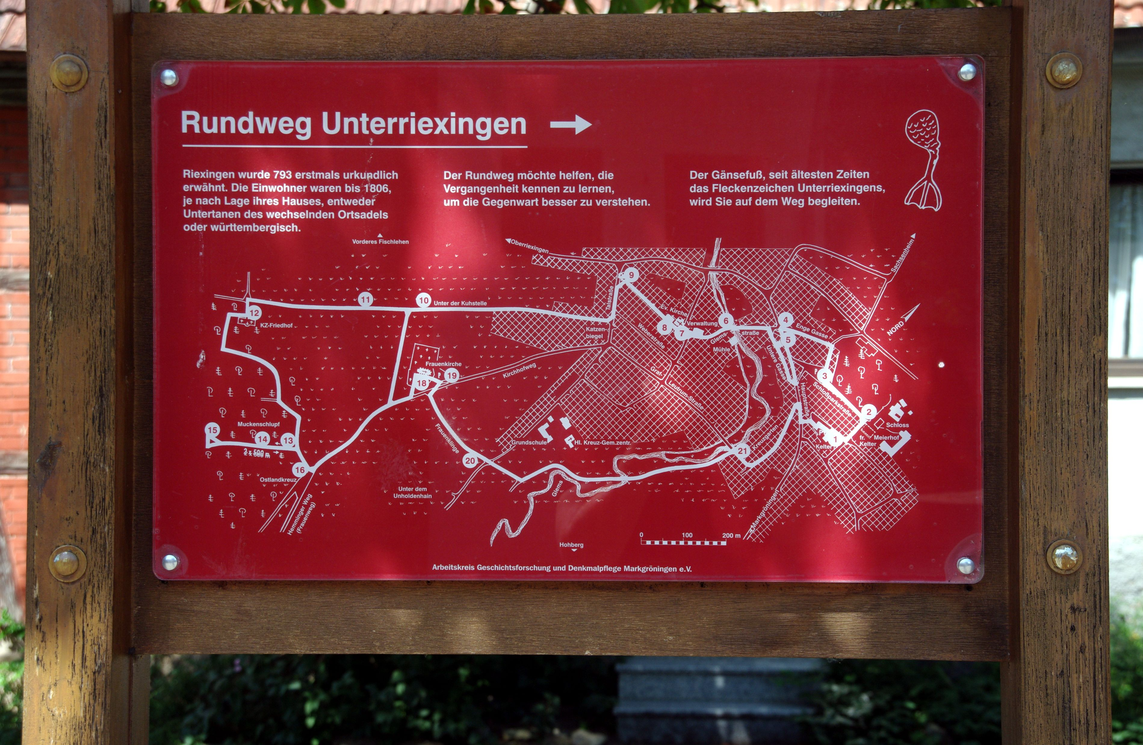 An der Kelter aufgestellter Übersichtsplan des Rundweges durch Unterriexingen